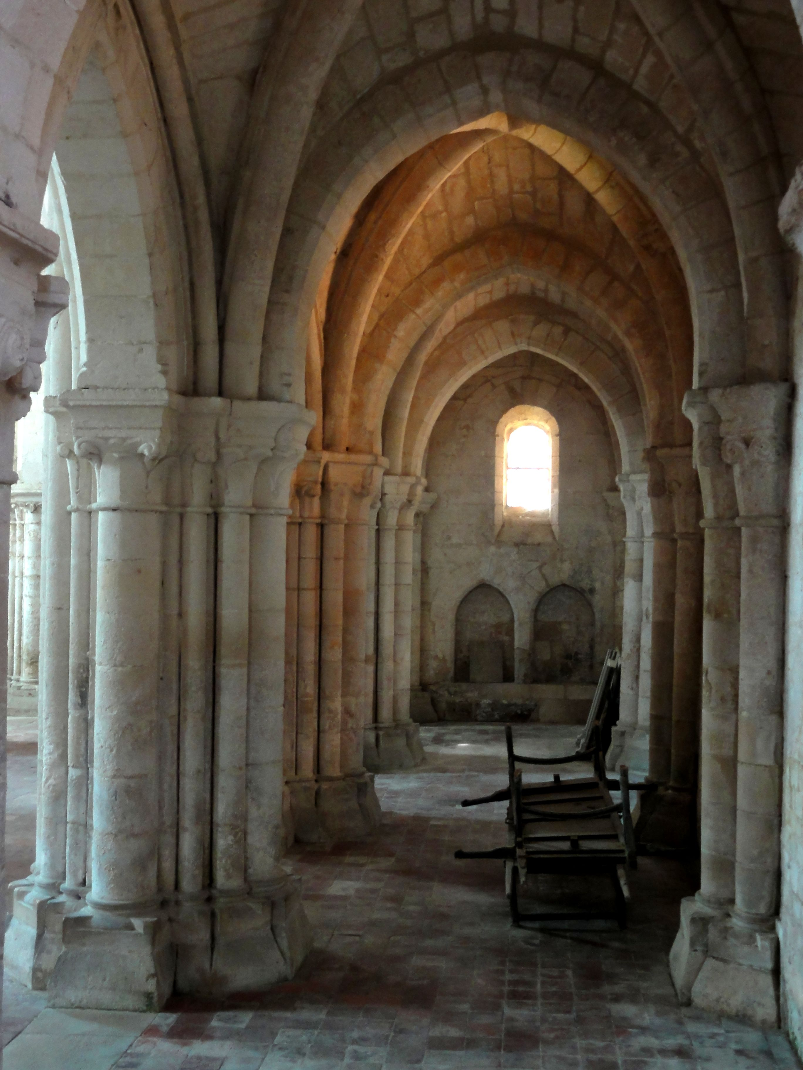 Bas-côté nord, vue vers l'ouest.